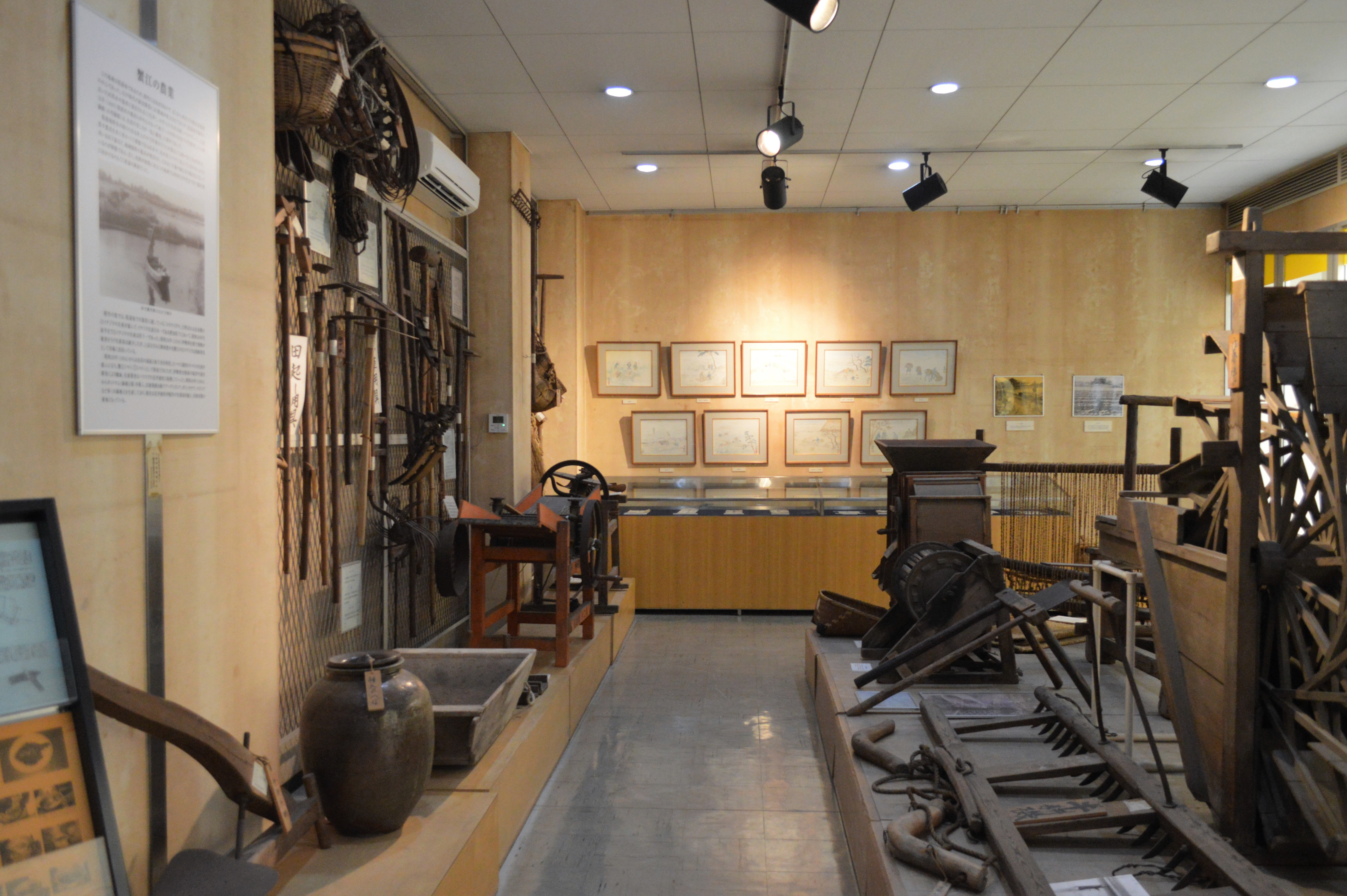 愛知県海部郡蟹江町にある蟹江町歴史民俗資料館。